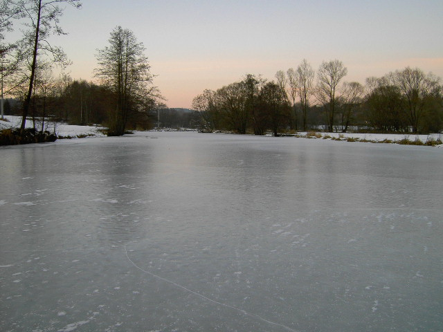 Die zugefrorene Waldnaab bei Neustadt an der Waldnaab im Januar 2006